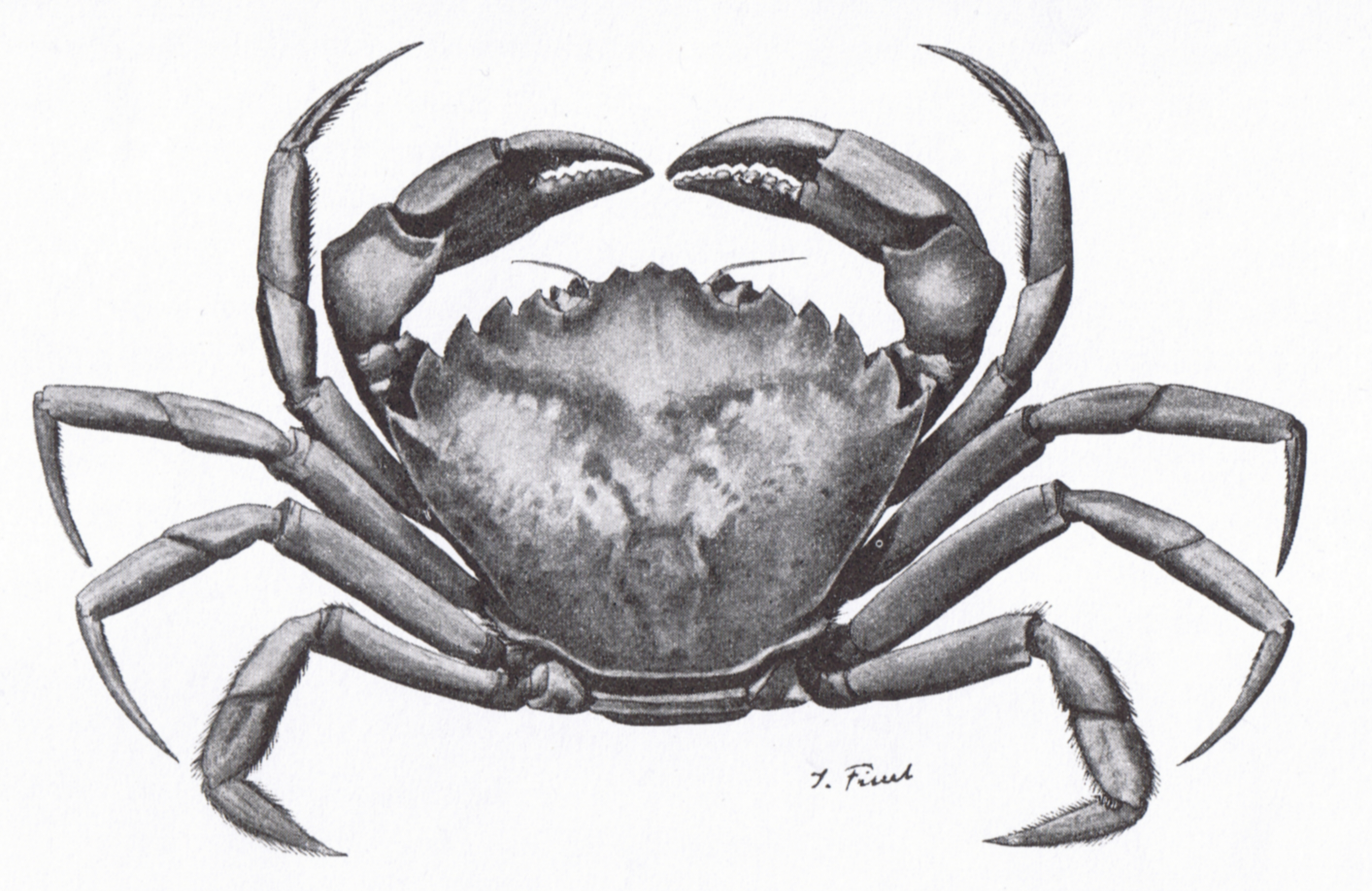 Kleiner Taschenkrebs (Carcinus maenas), Zeichnung von Julius Fürst um 1895